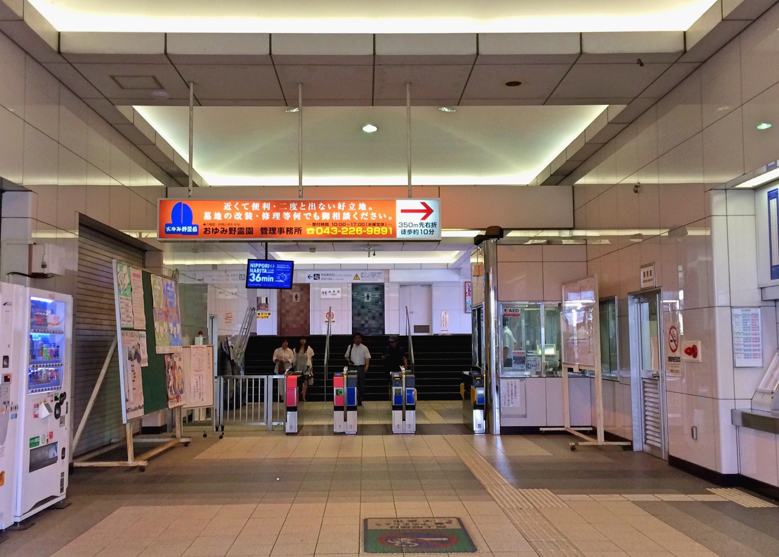 おゆみ野駅 改札口